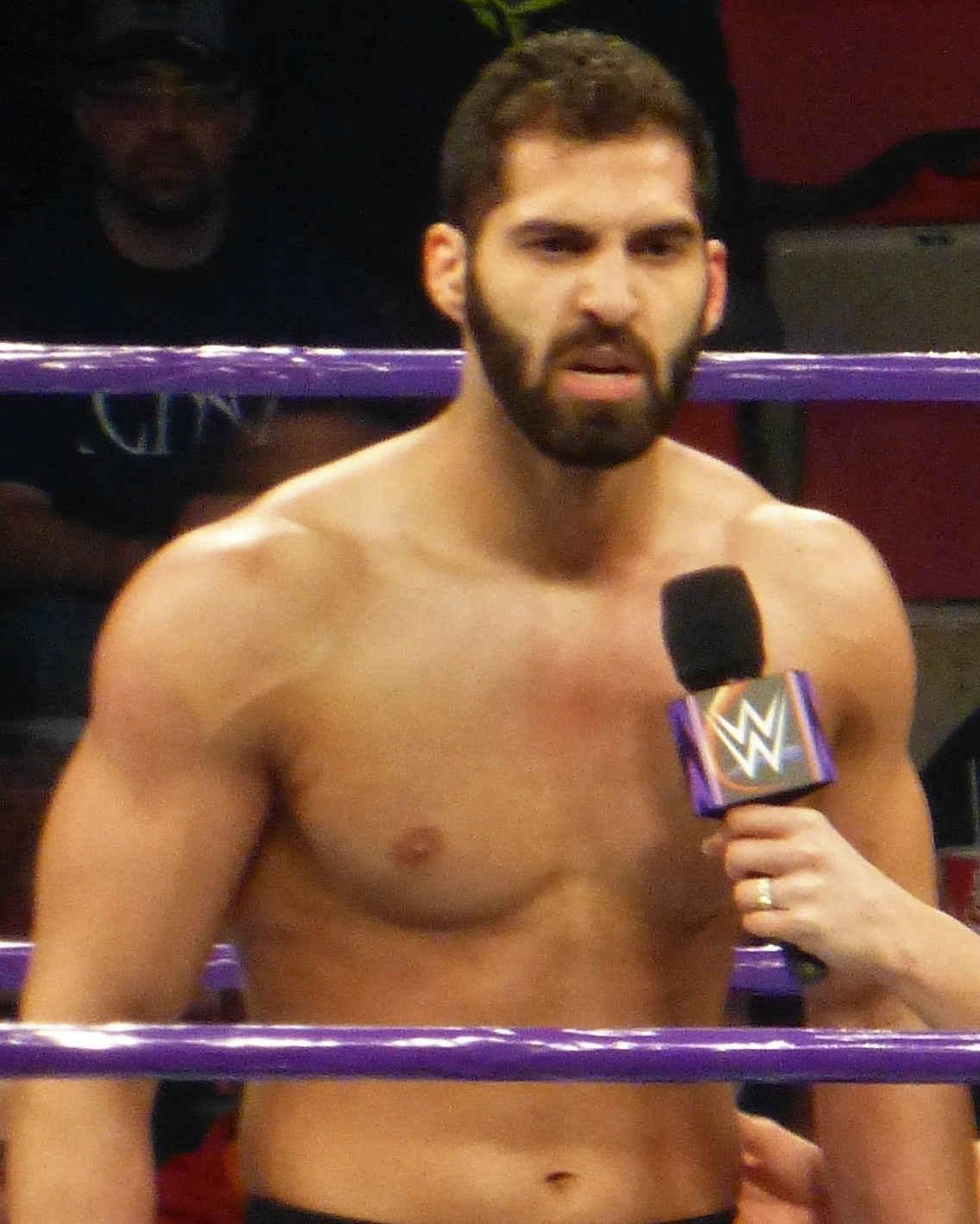 Ariya Daivari